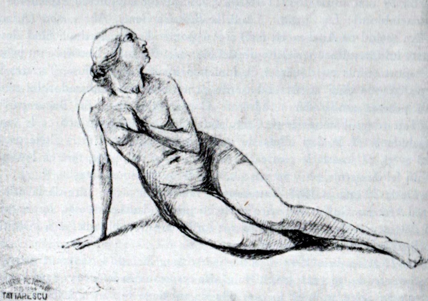 Gheorghe Tattarescu - Renașterea României (studiu), desen în creion, 0,16x0,22m - Muzeul Gheorghe Tattarescu